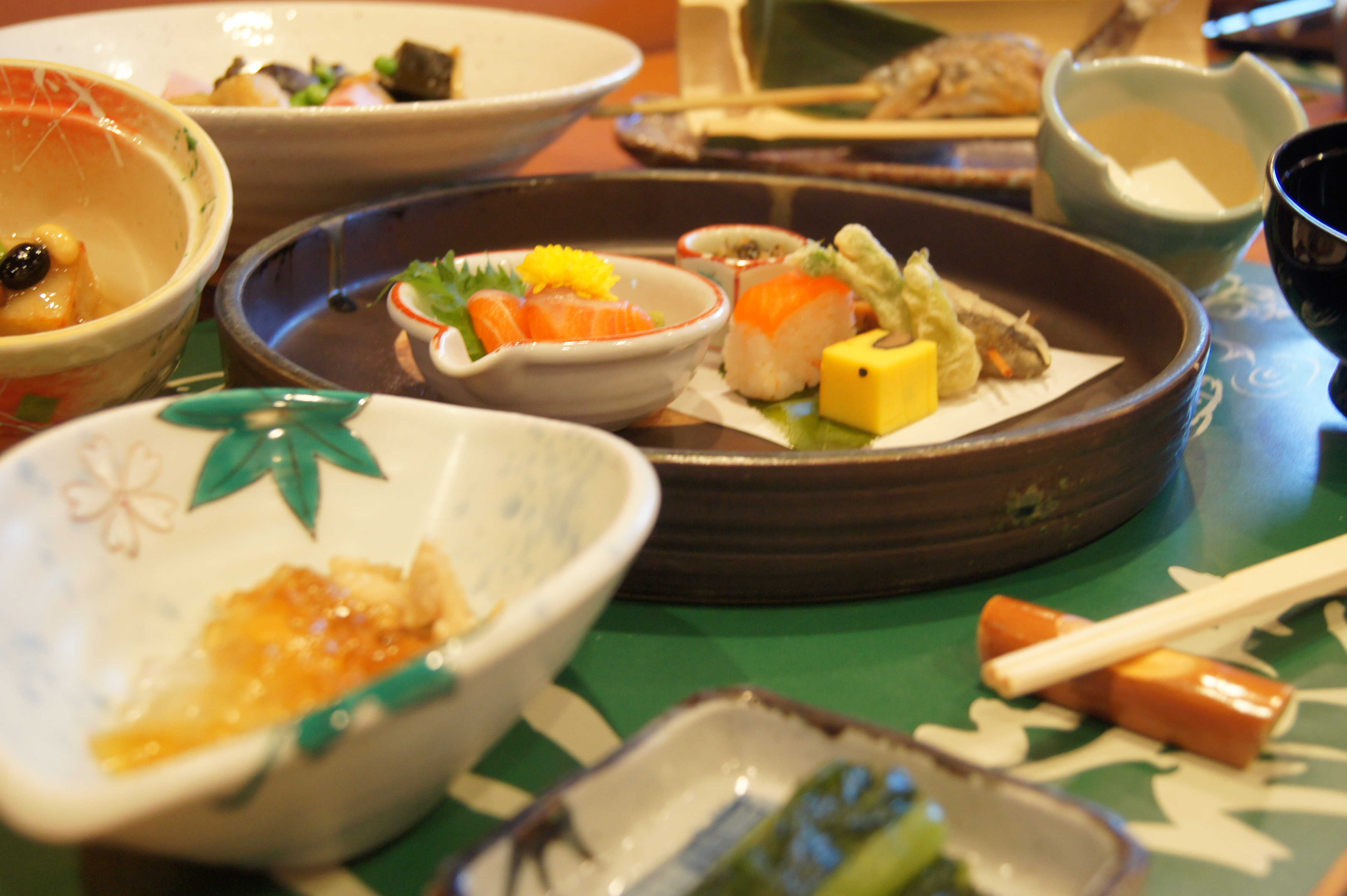 夕食・・・懐石料理の一例.